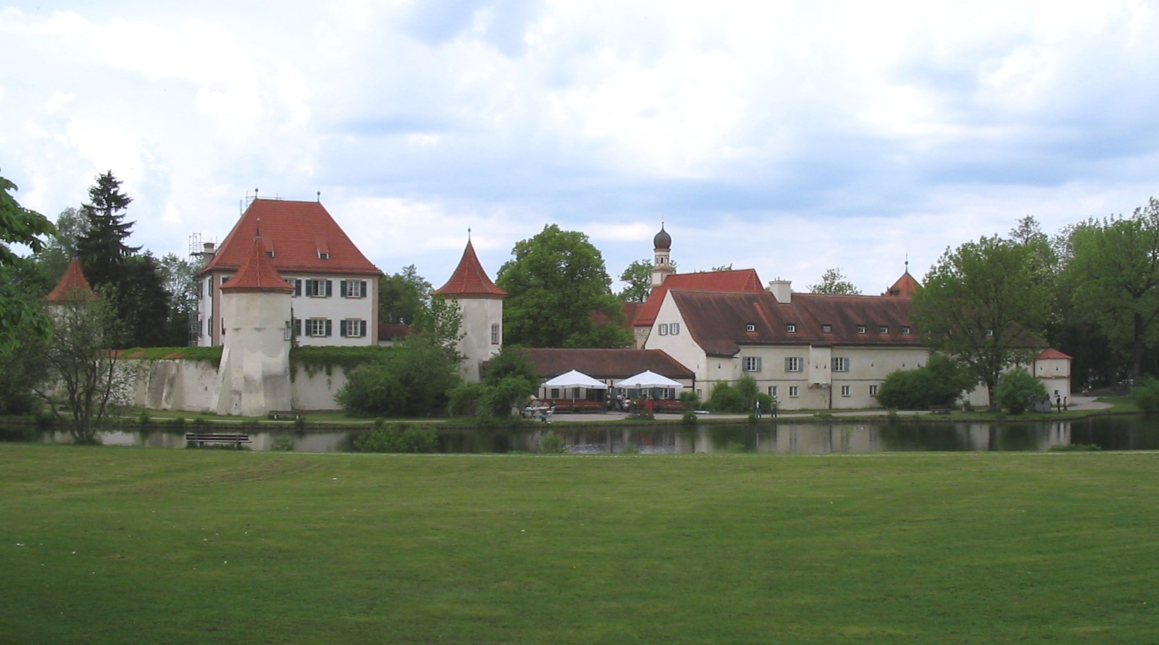 Schloss Blutenburg im Münchner Stadtteil Obermenzing